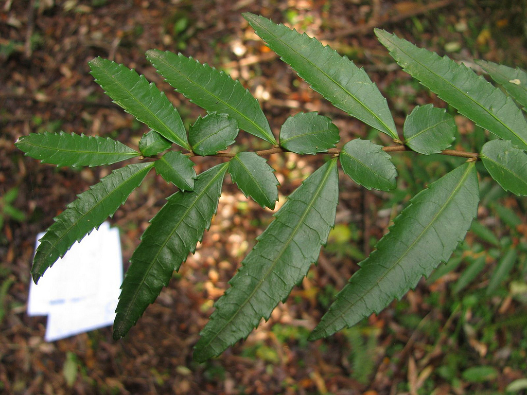 Azara lanceolata - leaves